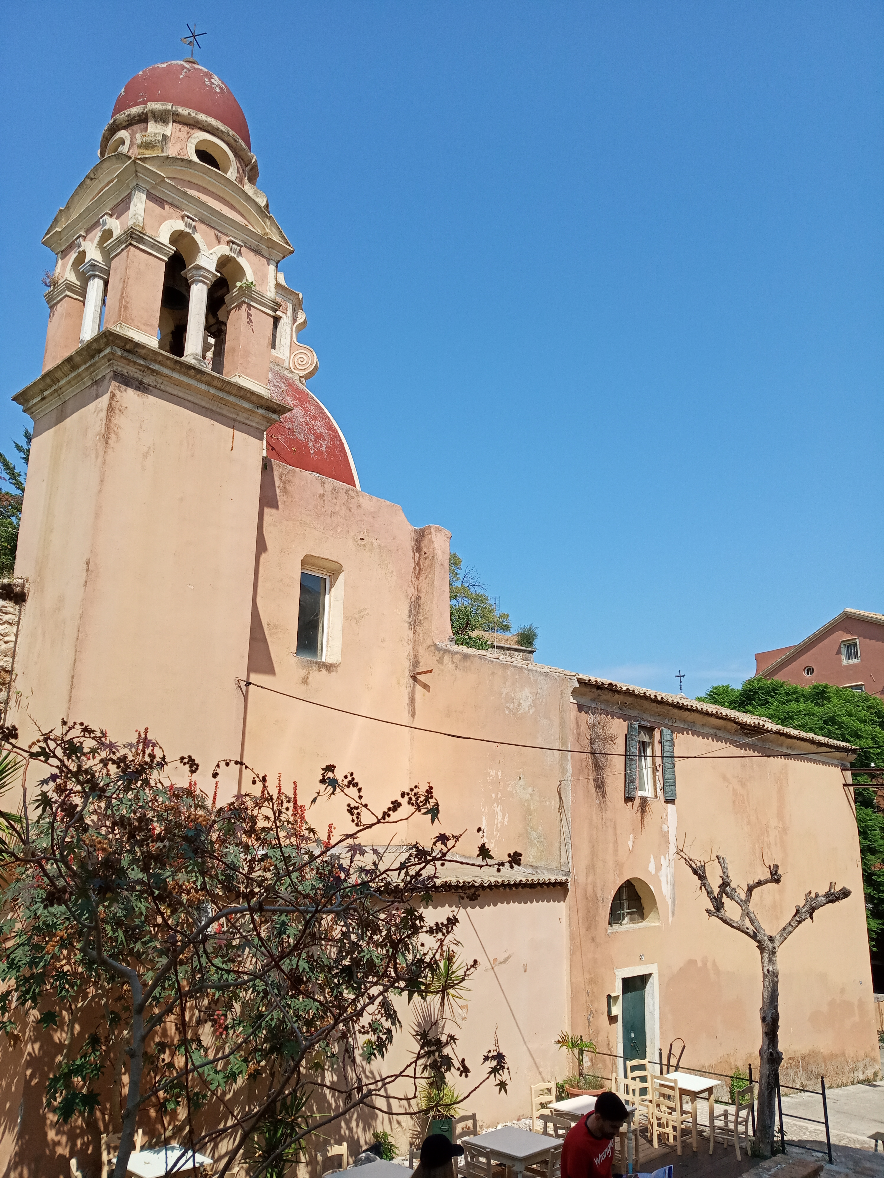 Католицька церква Діви Марії Тенедоської (Керкіра)